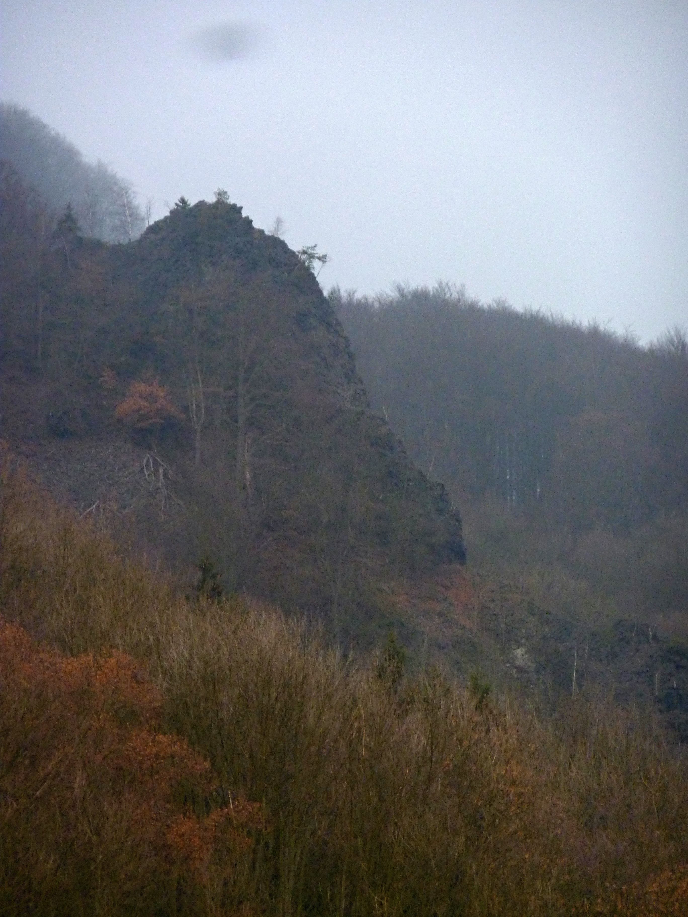 PP Čedičová žíla Boč celkový pohled z jihu